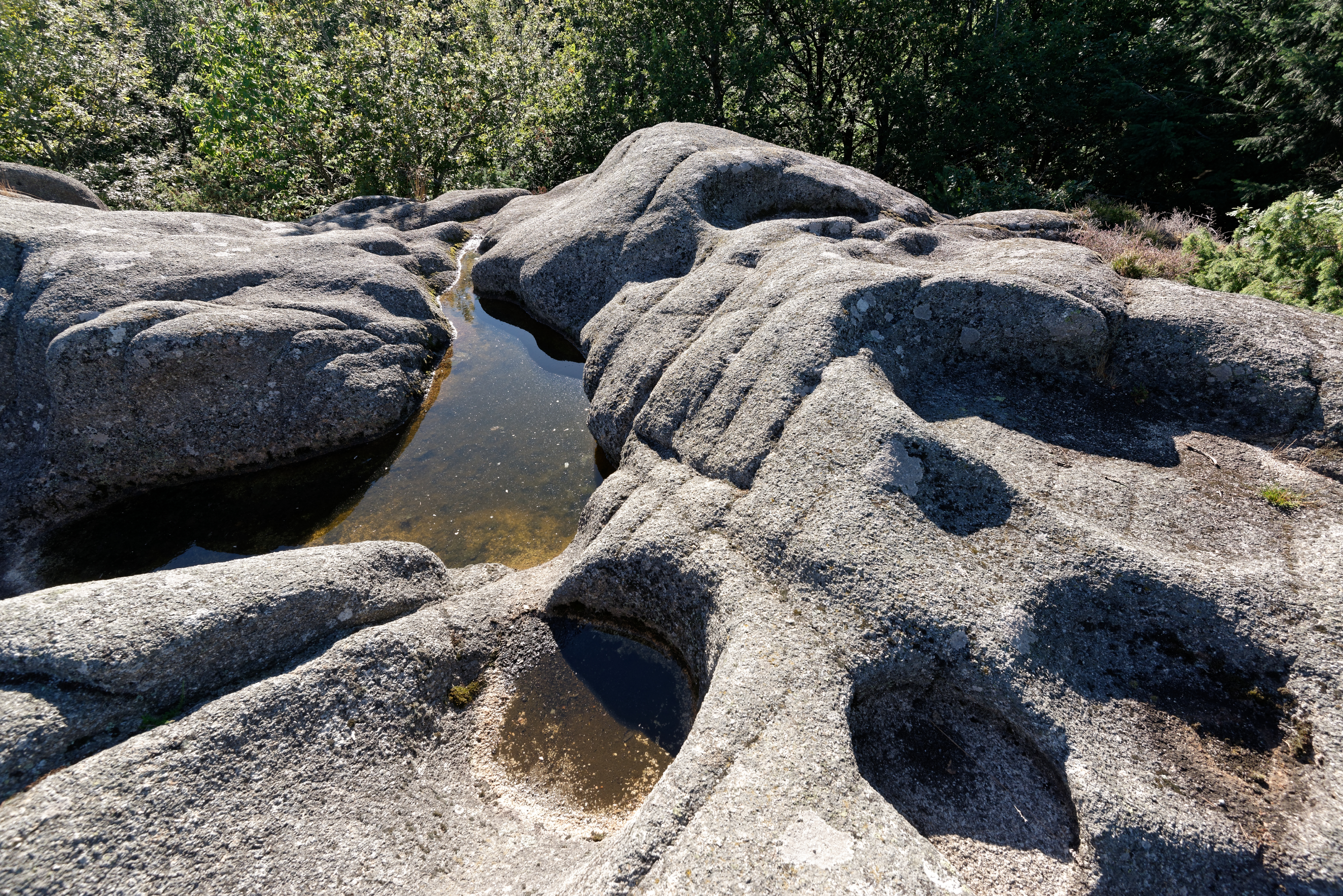 Le Rocher du Combeau, mégalithe à cupules au lieu-dit Rongère Montagne, à la limite entre les communes de Lachaux et Châteldon, dans le Puy-de-Dôme.